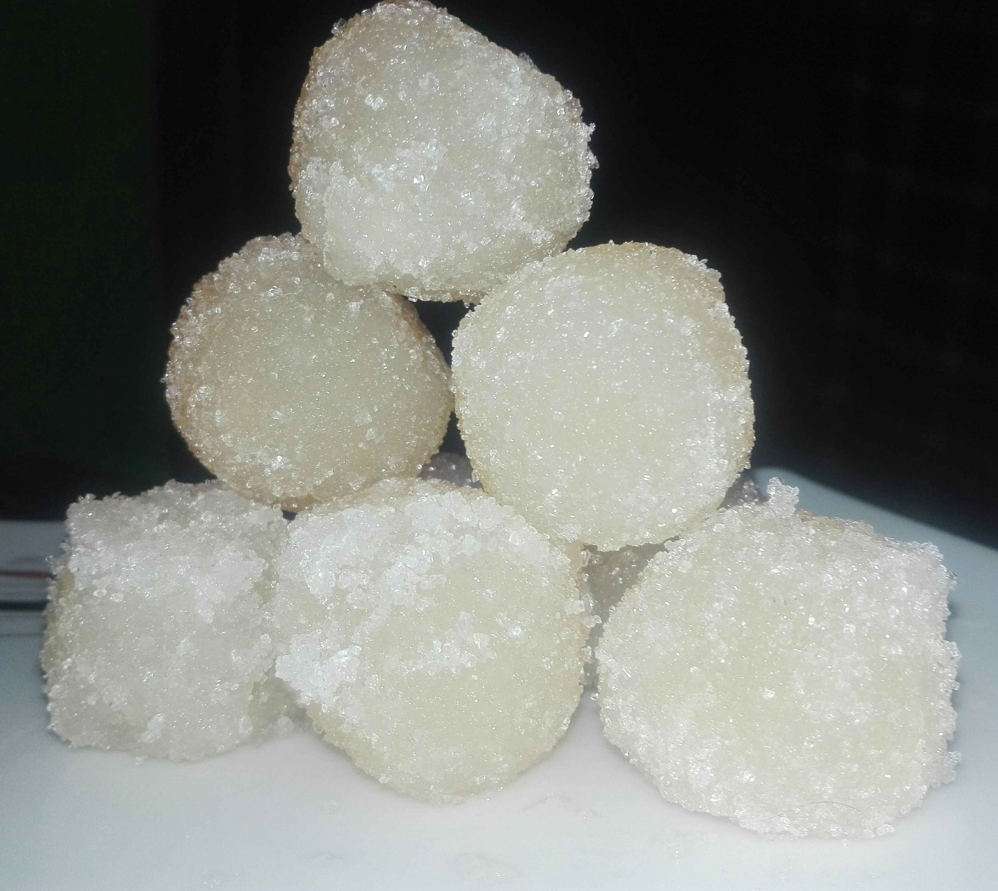 বাংলার মিষ্টি যা বাংলাদেশ এবং ভারতে প্রচলিত।